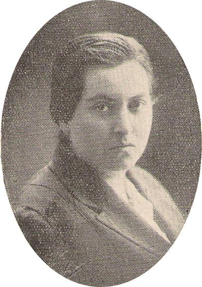 Lucila de María del Perpetuo Socorro Godoy Alcayaga, conocida por su seudónimo Gabriela Mistral (Vicuña, 7 de abril de 1889 – Nueva York, 10 de enero de 1957), fue una destacada poetisa, diplomática y pedagoga chilena, de las principales figuras de la literatura chilena y latinoamericana, es la primera persona latinoamericana y primera mujer americana en ganar el Premio Nobel de Literatura, el cual recibió en 1945.